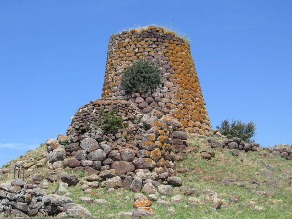 Nuraghi Culture, Sardinia, Italy. Foto: Mihai Sorin Sirbu